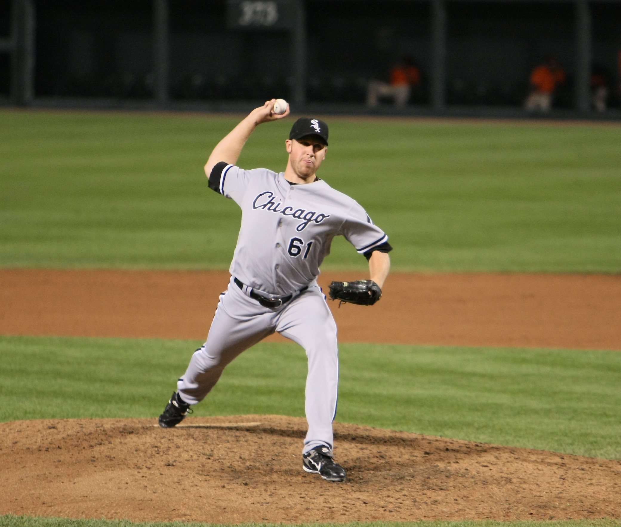 Adam Russell